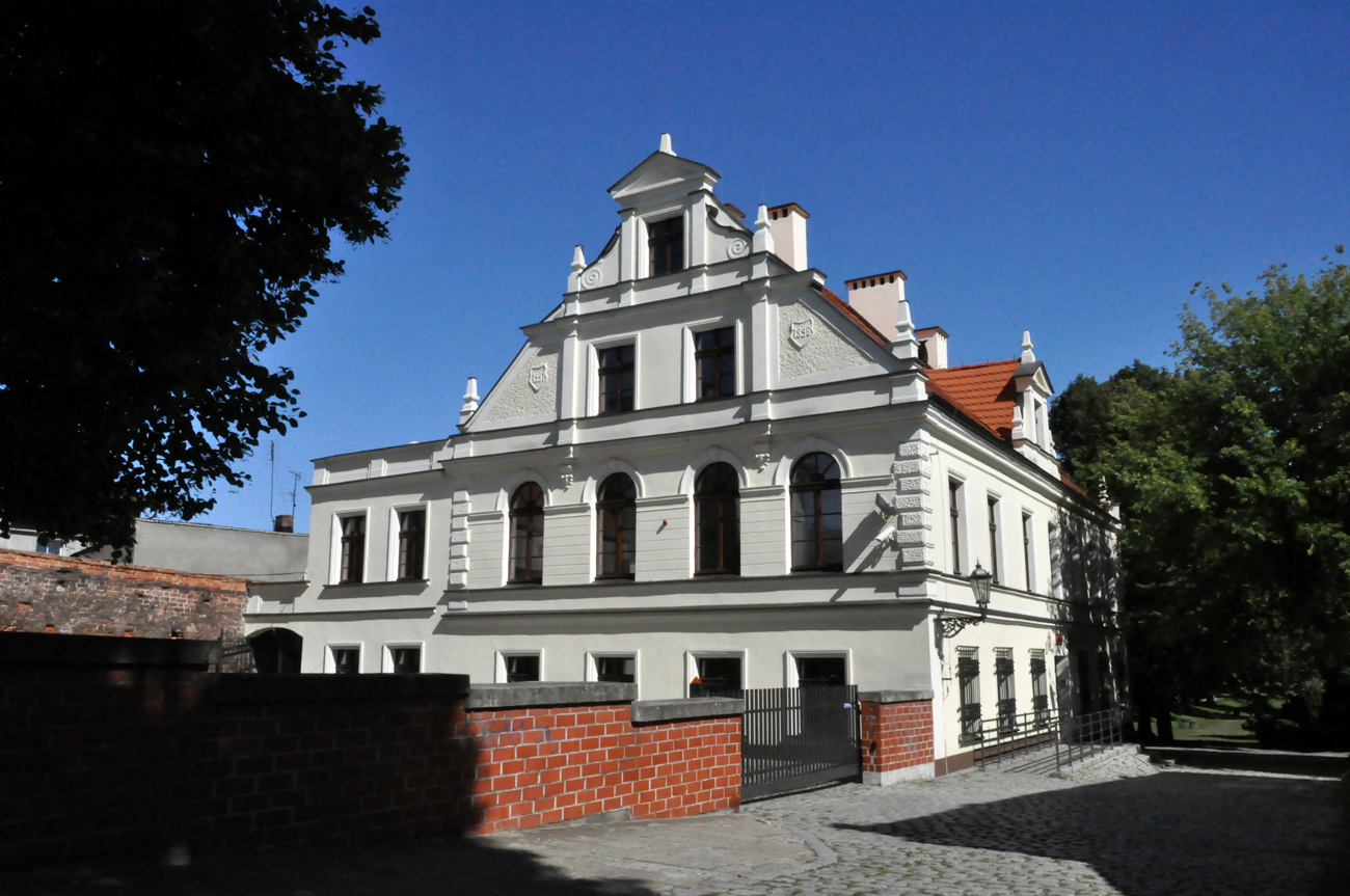 Środa Śląska, ul. Parkowa 1 - dom, 1898 (zabytek nr A/3792/542/W)